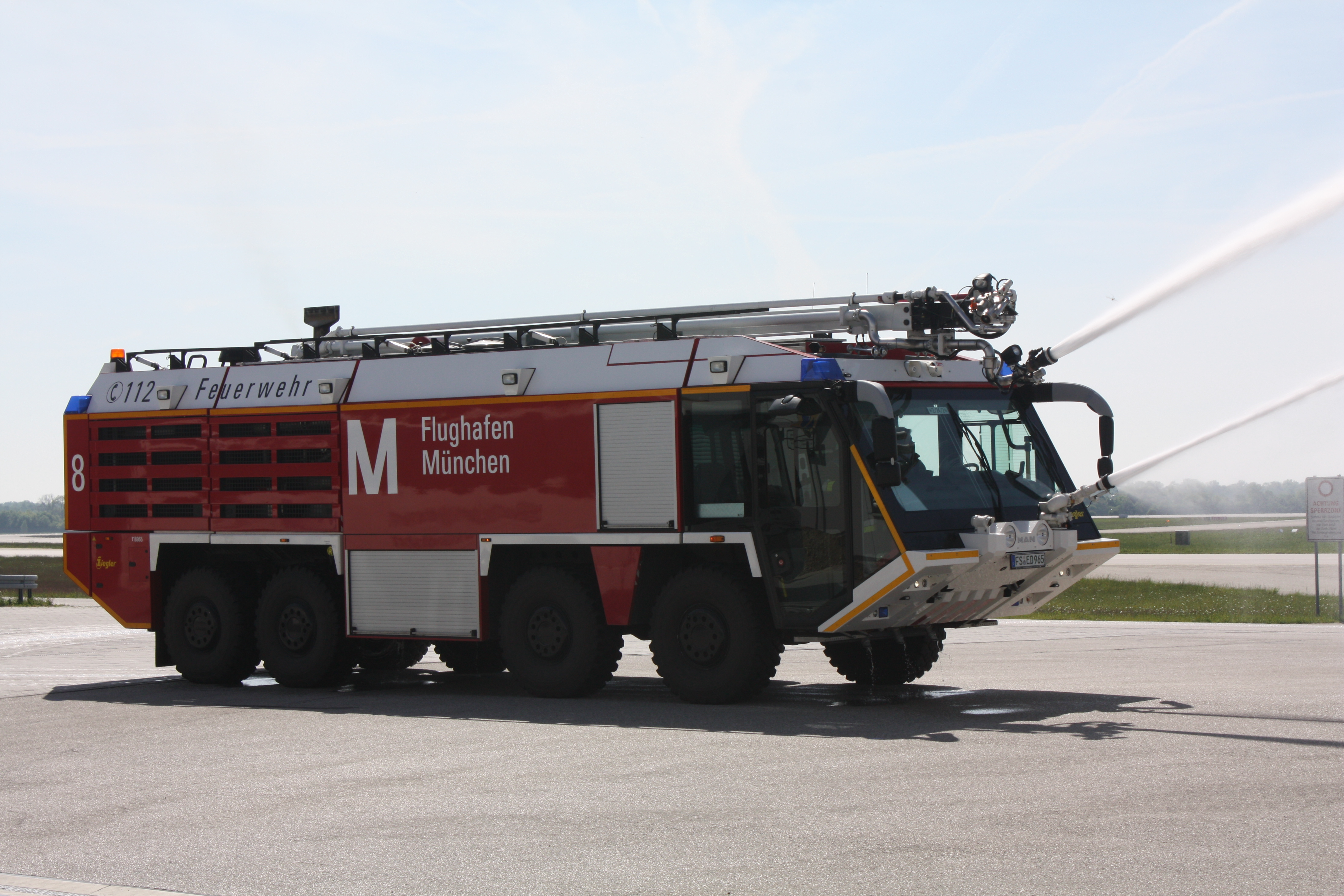 Flugfeldlöschfahrzeug Ziegler Z8, Flughafen München. Zwei Wasserkanonen im Einsatz